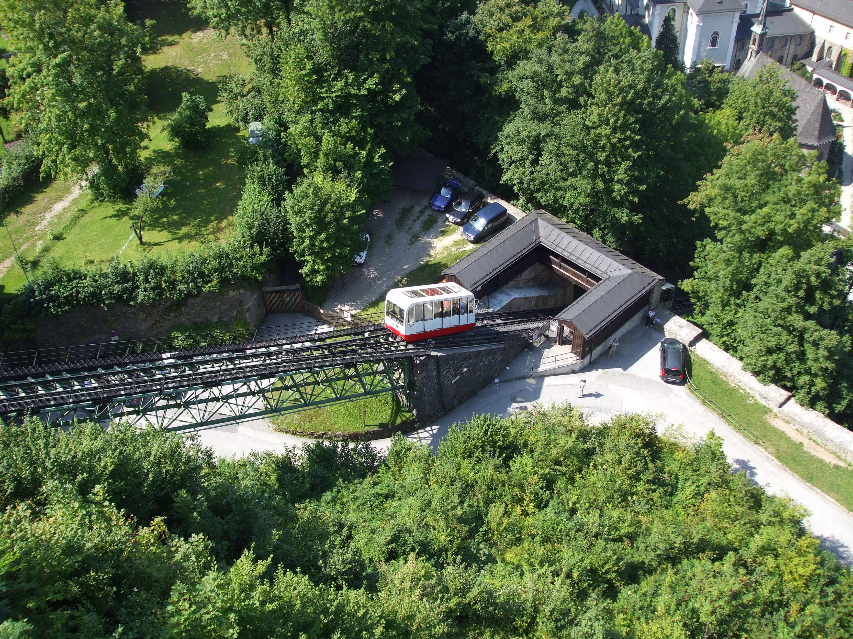 Festungsbahn